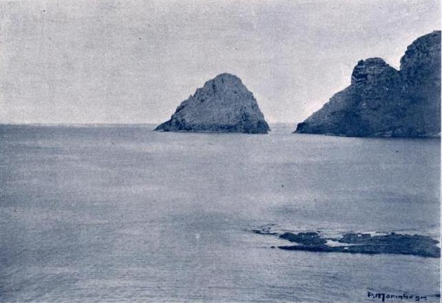 "Ilhéu do Romeiro na Bahia de San Lourenço", freguesia de Santa Bárbara, concelho de Vila do Porto, ilha de Santa Maria, Açores, in Álbum Açoriano, fascículo nº 35, 1903, p. 275.